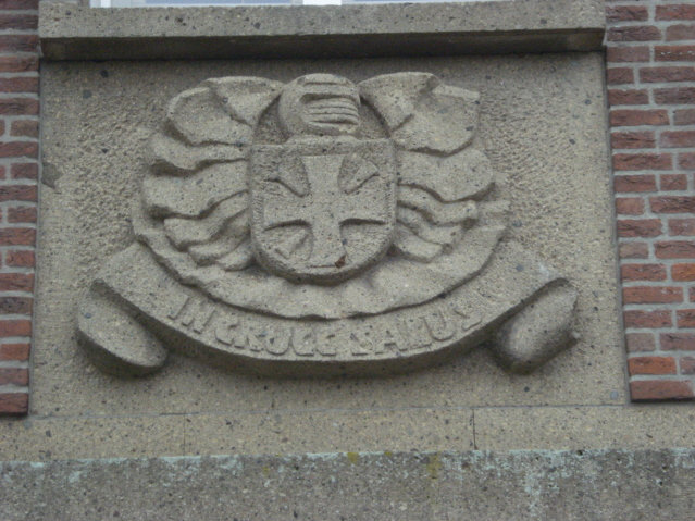 Sint Agatha, blason des chanoines de la Sainte-Croix